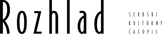 Logo der Zeitschrift Rozhlad